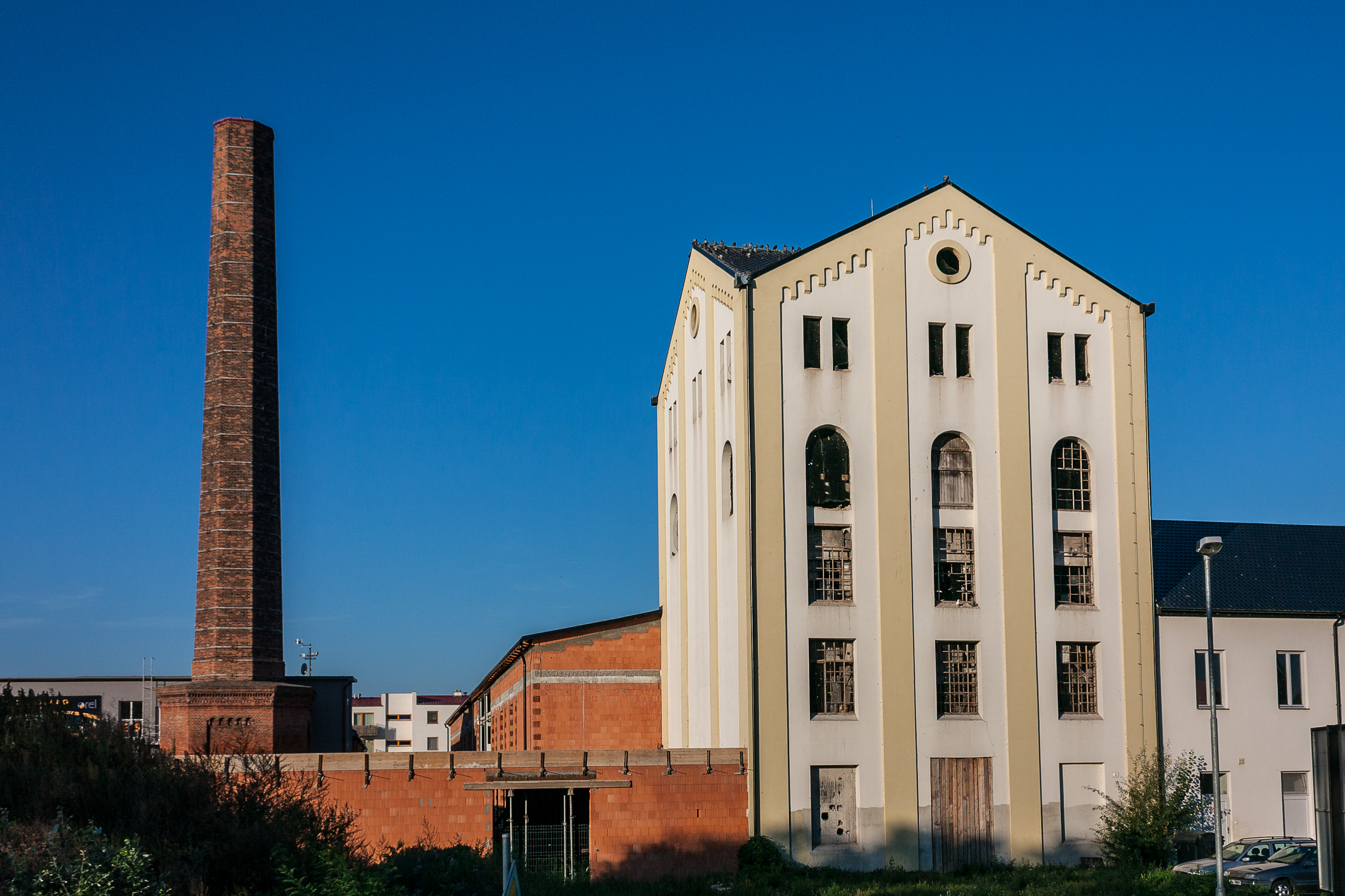 Cukrovar, z toho jen: filtrační věž a komín (Židlochovice), Nádražní, Masarykova, Židlochovice